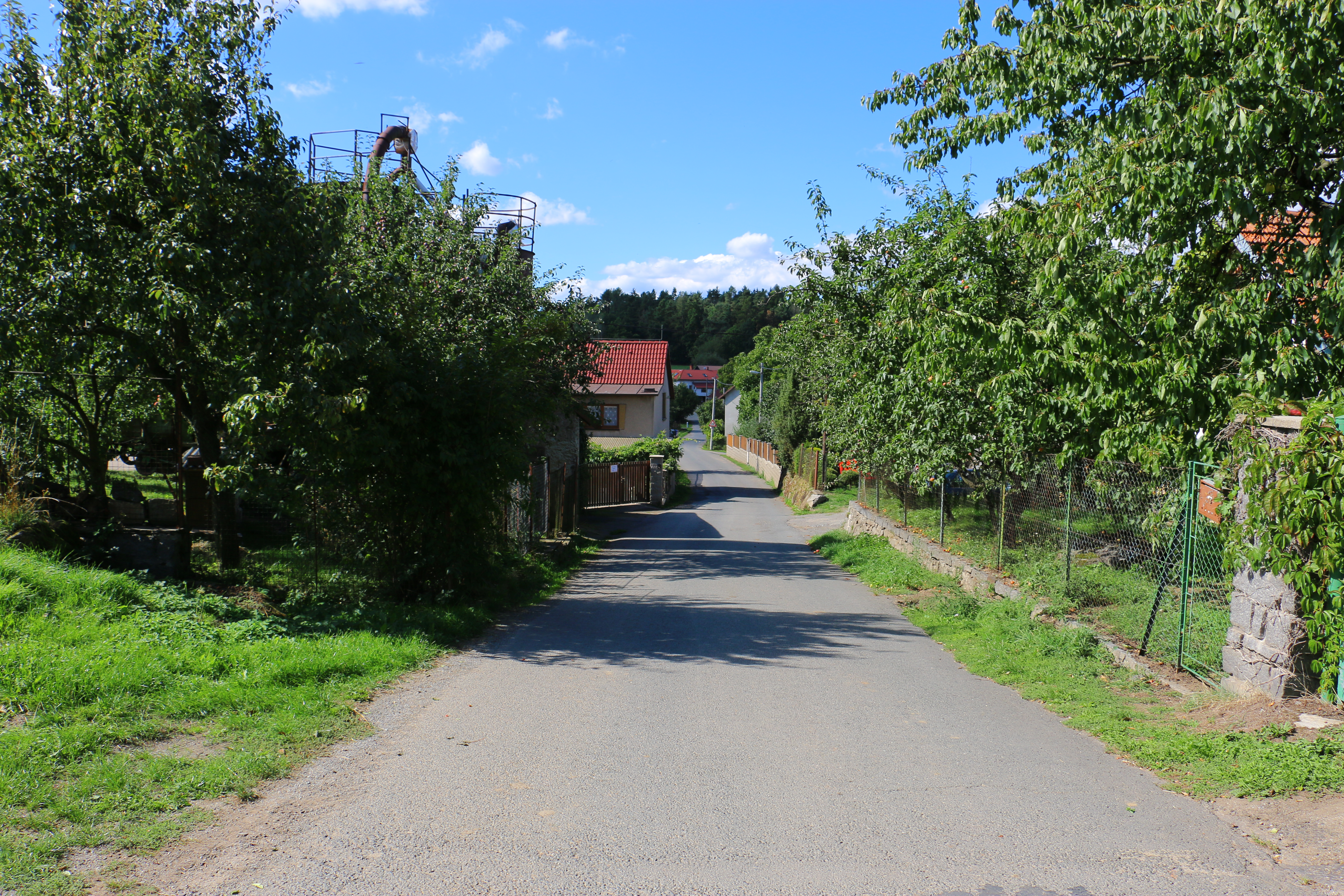 Minartice, okres Benešov, průjezd vesnicí Project: Fotíme Česko.